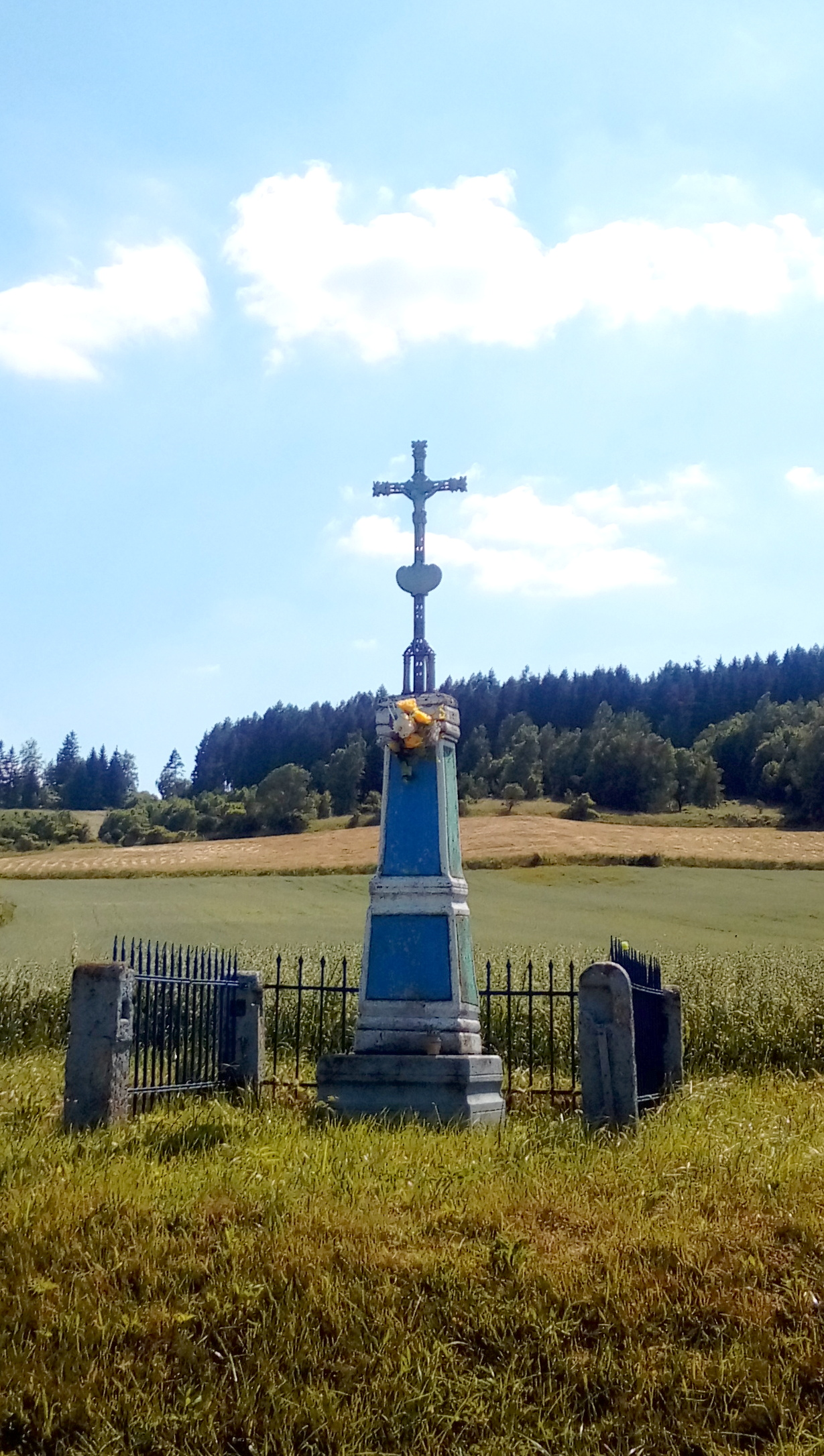 Krzyż przydrożny przy drodze pomiędzy Przedwojowem a Janiszowem